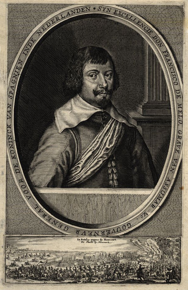 portrait de Francisco de melo, comte de Assumar surmontant la bataille de Honnecourt. Gravure du XVIIème siècle